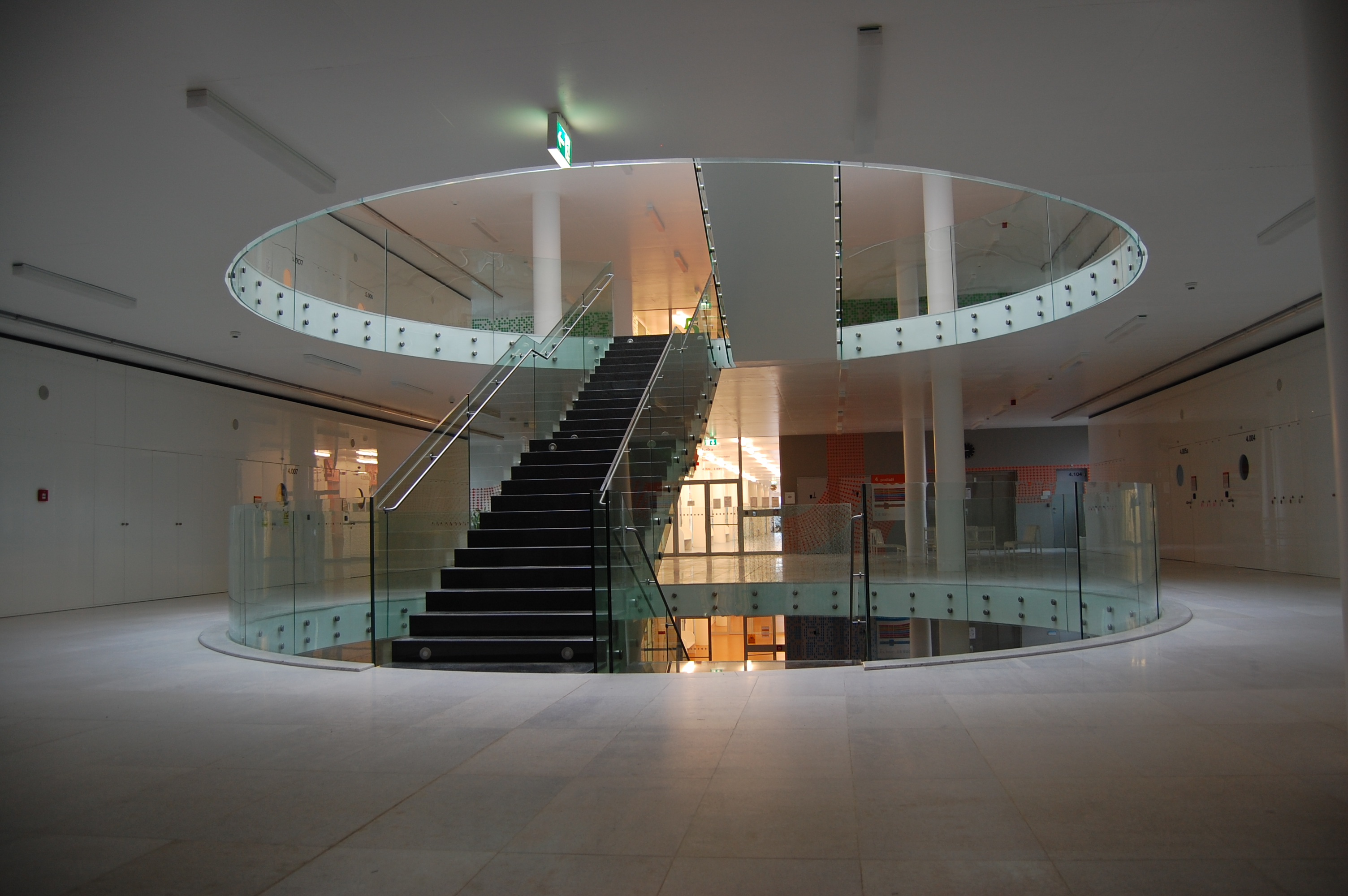 Přírodovědecká fakulta - schodiště ve 4. patře, Univerzita Palackého, Olomouc